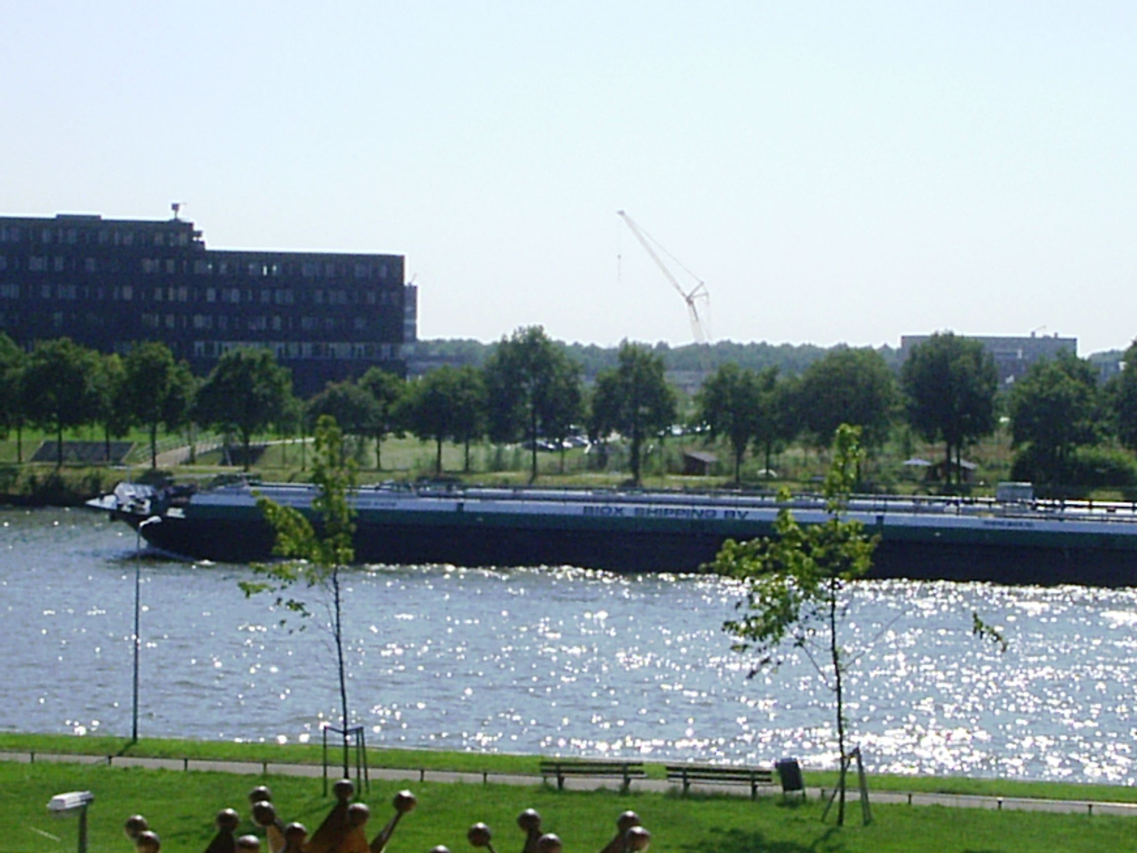 Riverboat at Amsterdam Rijnkanaal in Utrecht